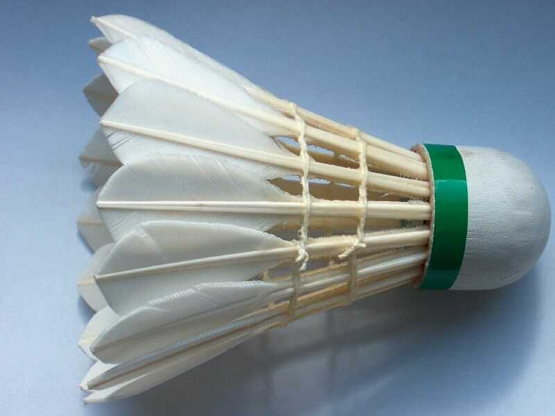 Volant de badminton en plume d'oie fait à la main